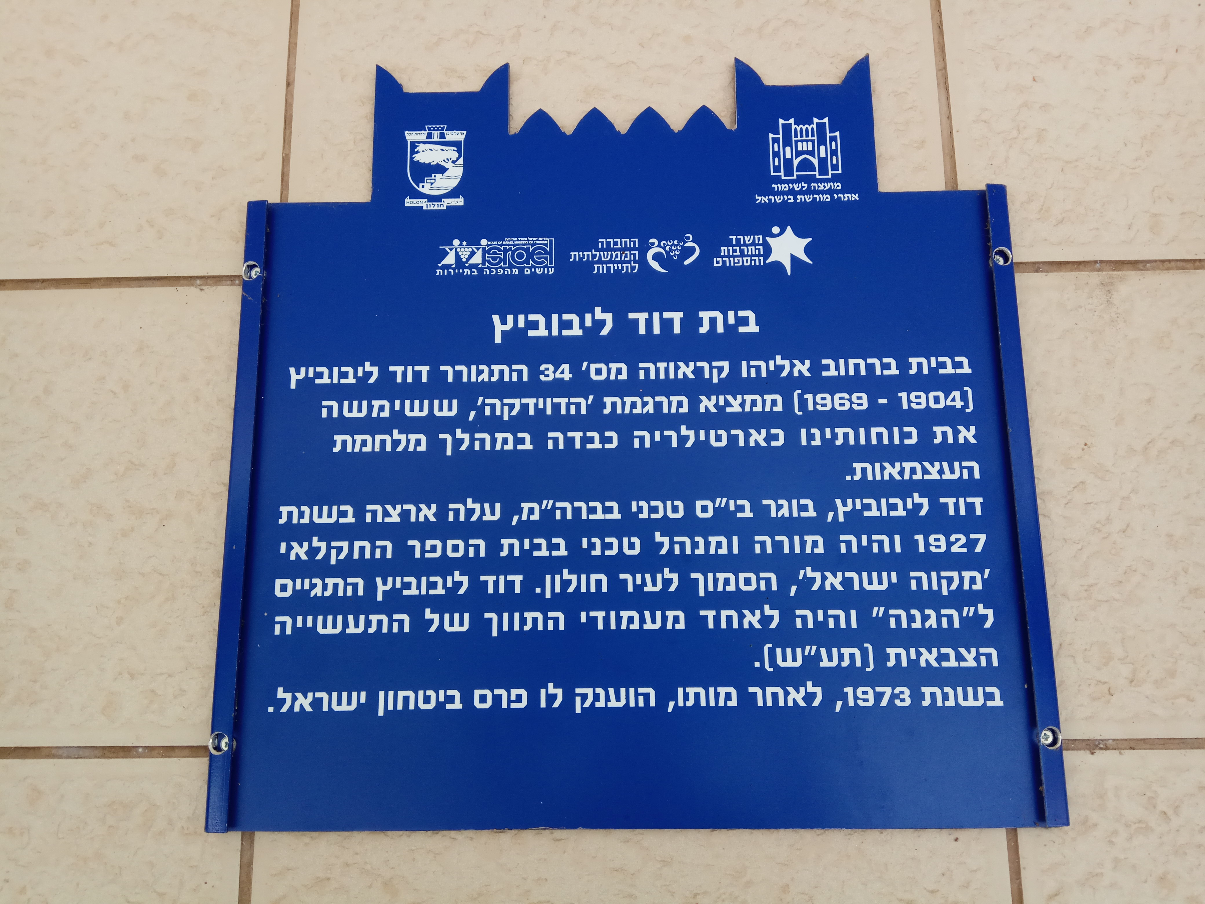 לוחית זיכרון לדוד ליבוביץ במקום שעמד פעם ביתו ברחוב קראוזה 34 בחולון